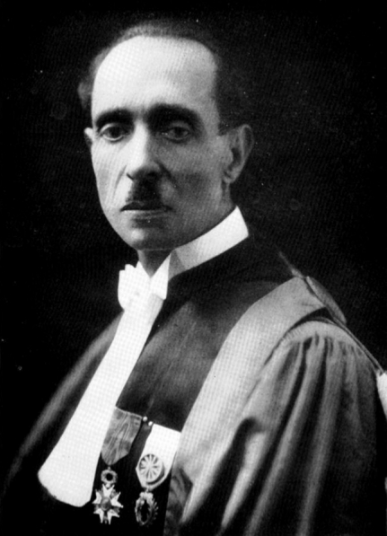 photographie officielle avec sa toge et décoration